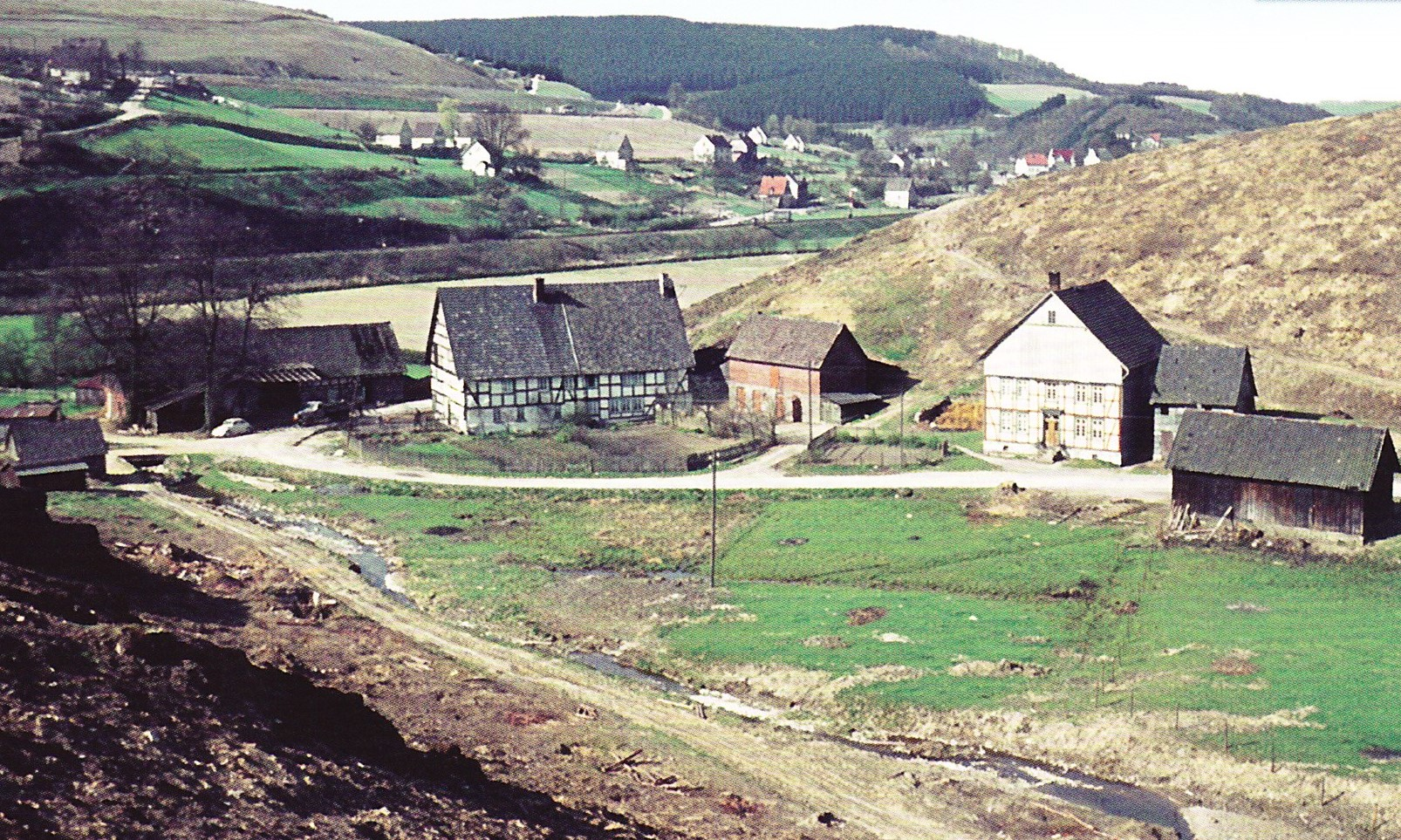 Blick auf den ehemaligen Attendorner Ortsteil Imminghausen, der dem Bau der Biggetalsperre (1956–1965) weichen musste. Im Hintergrund Listernohl. Postkartenfoto um 1960. Text: „1364 erstmals urkundlich erwähnt, gehörte der Hof zum erzbischöflichen Burglehen Waldenburg und gelangte so in den Besitz der Freiherren von Fürstenberg. Seit 1771 war Imminghausen der Stammhof der Familie Heuel und wurde 1818 freies Gut, dessen Haupteinkünfte aus umfangreichem Forstbesitz flossen.“ Foto: Archiv Hans-Werner Scharloth